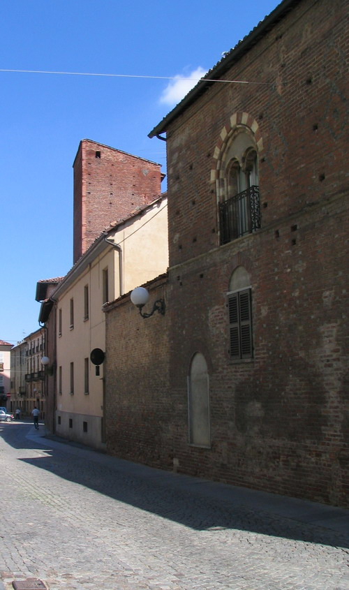 Asti, Torre Gazzelli. Foto fatta da me, Faberh 2006.